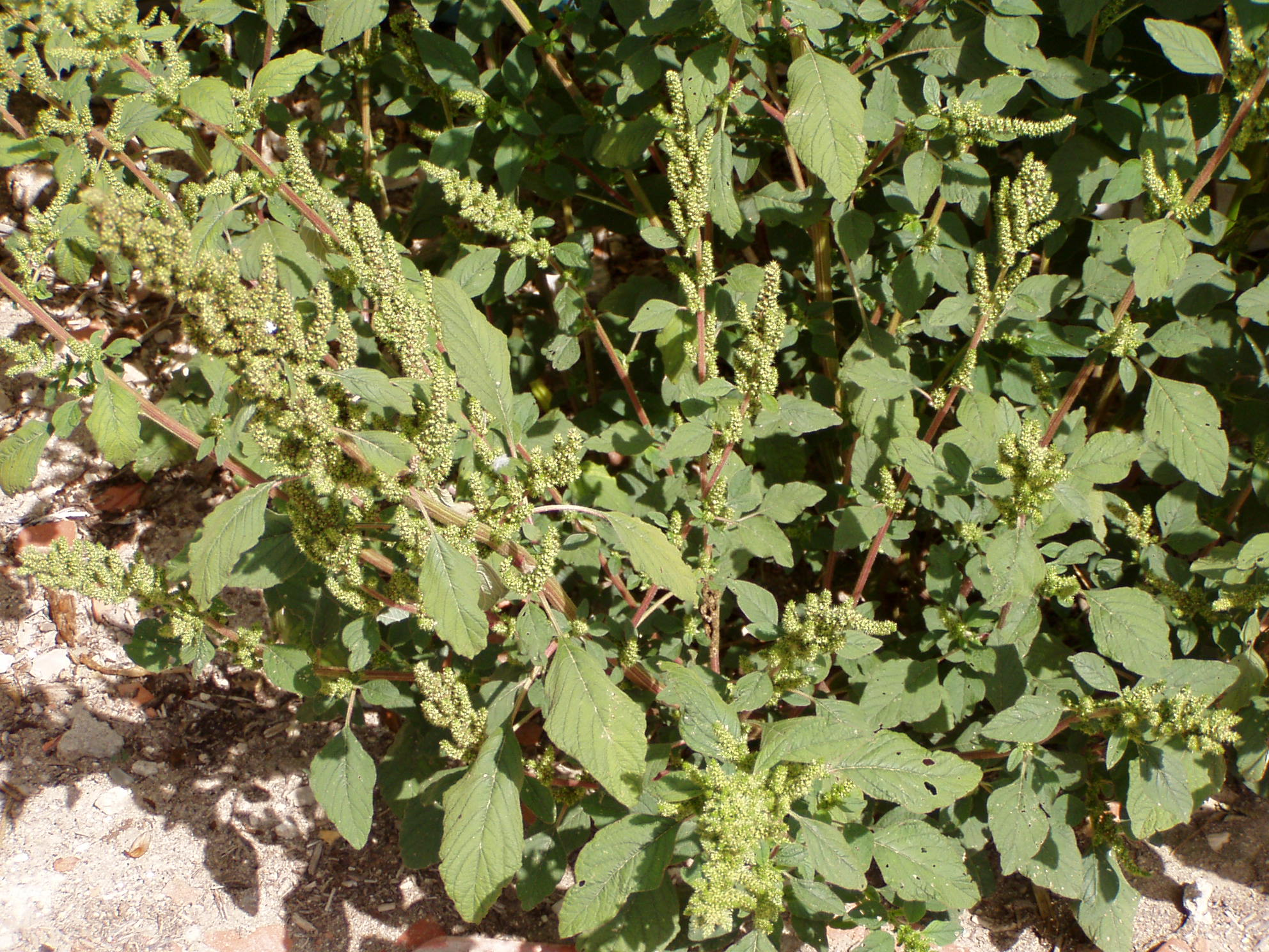 Flowers. Alcobaça, Portugal.